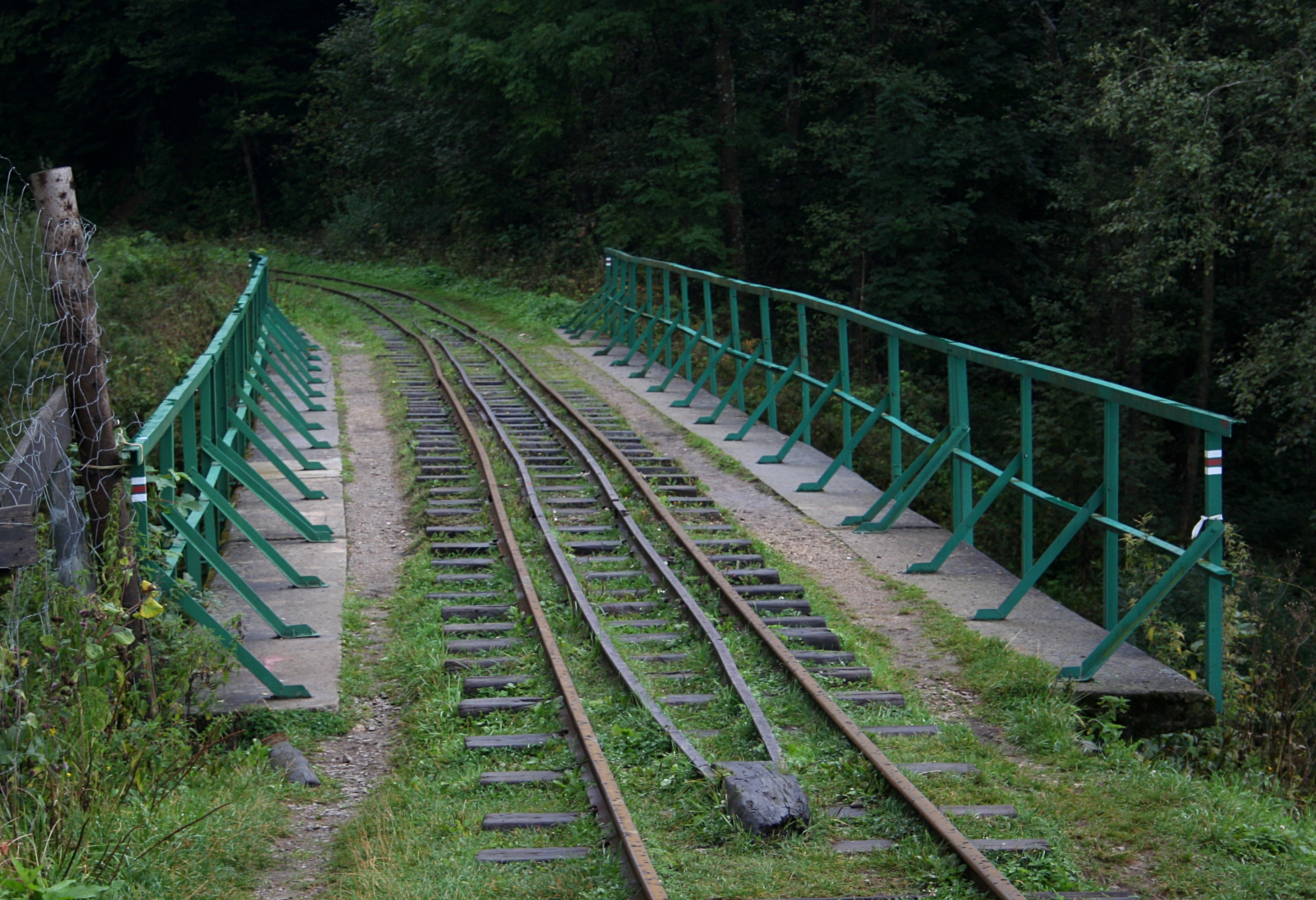 Kolej wąskotorowa w Cisnej, woj. podkarpackie